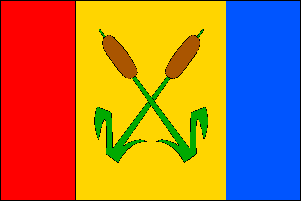 vlajka, Osek nad Bečvou, okres Přerov